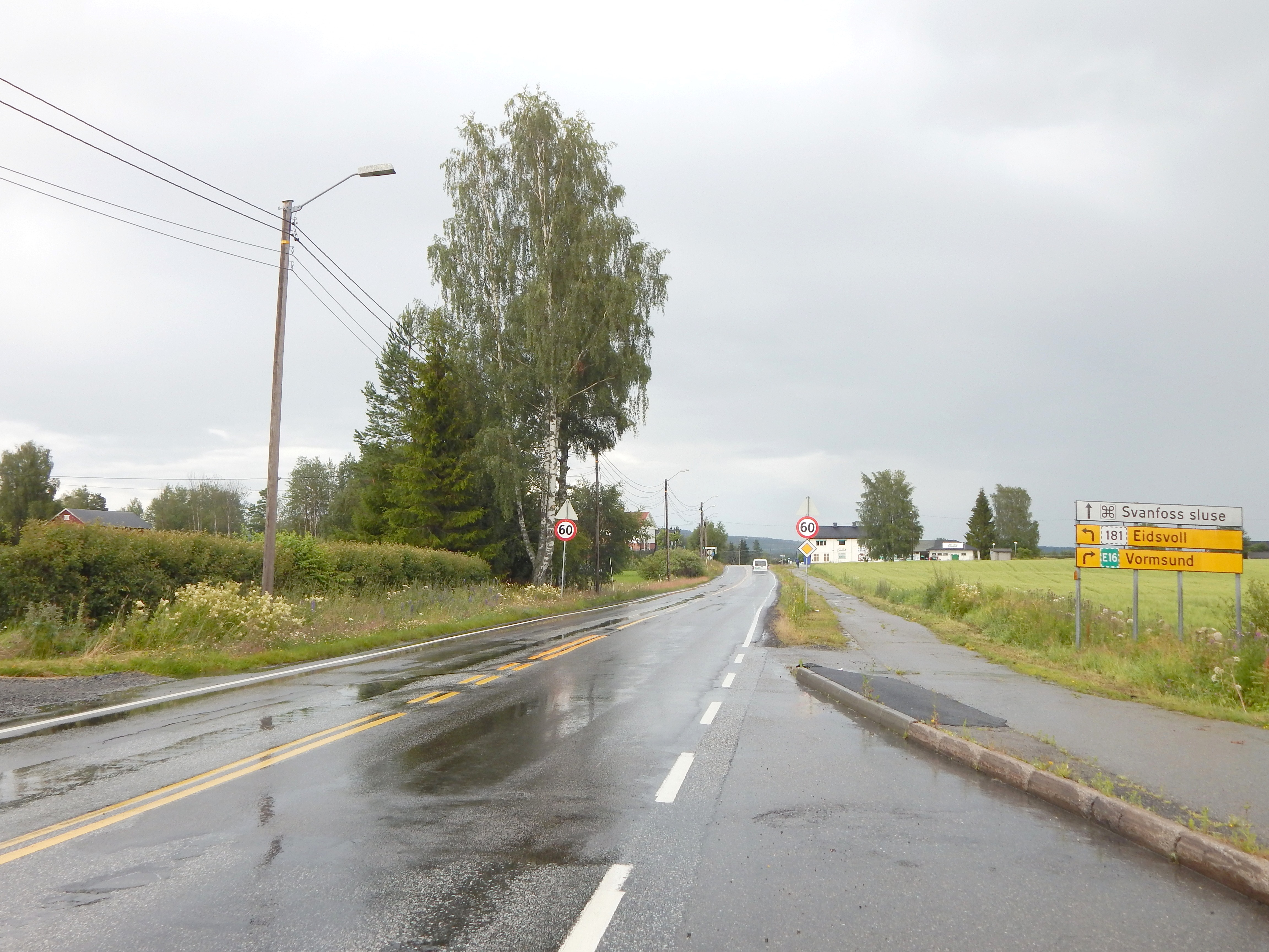 Primær fylkesvei 179 går gjennom Brårud i Nes